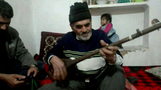 1395 پیریحیی زالی دوتار زن معروف منطقه بام و صفی اباد ساکن روستای زالی